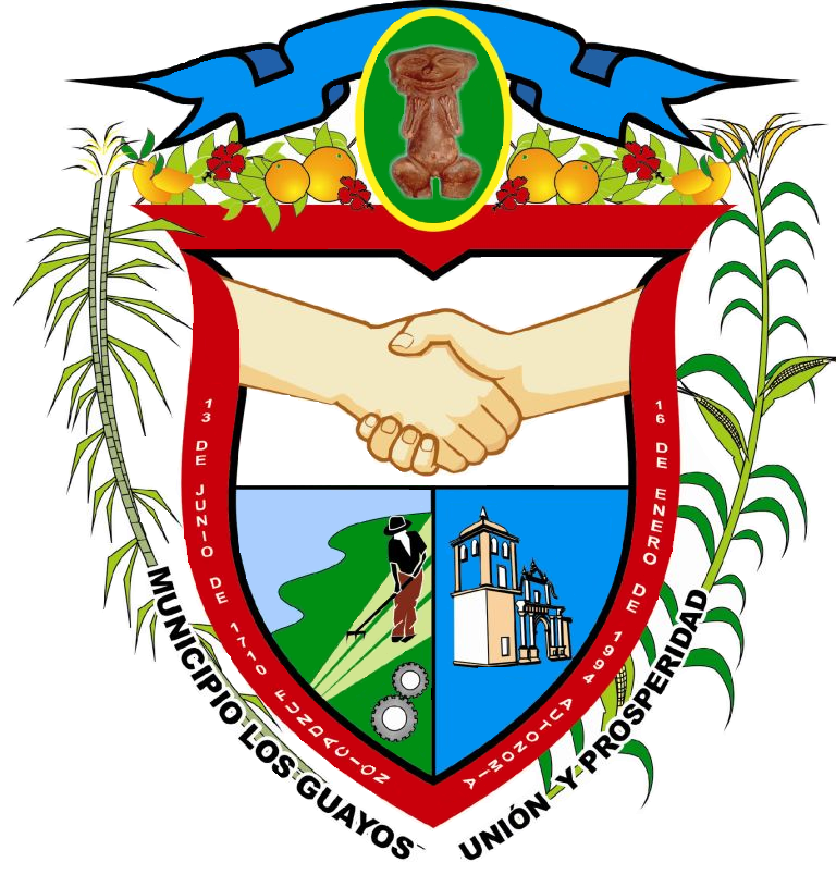 Escudo del municipio Los Guayos, estado Carabobo, Venezuela